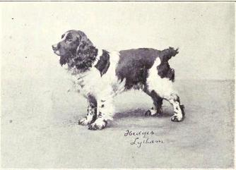 Cocker Spaniel from 1915